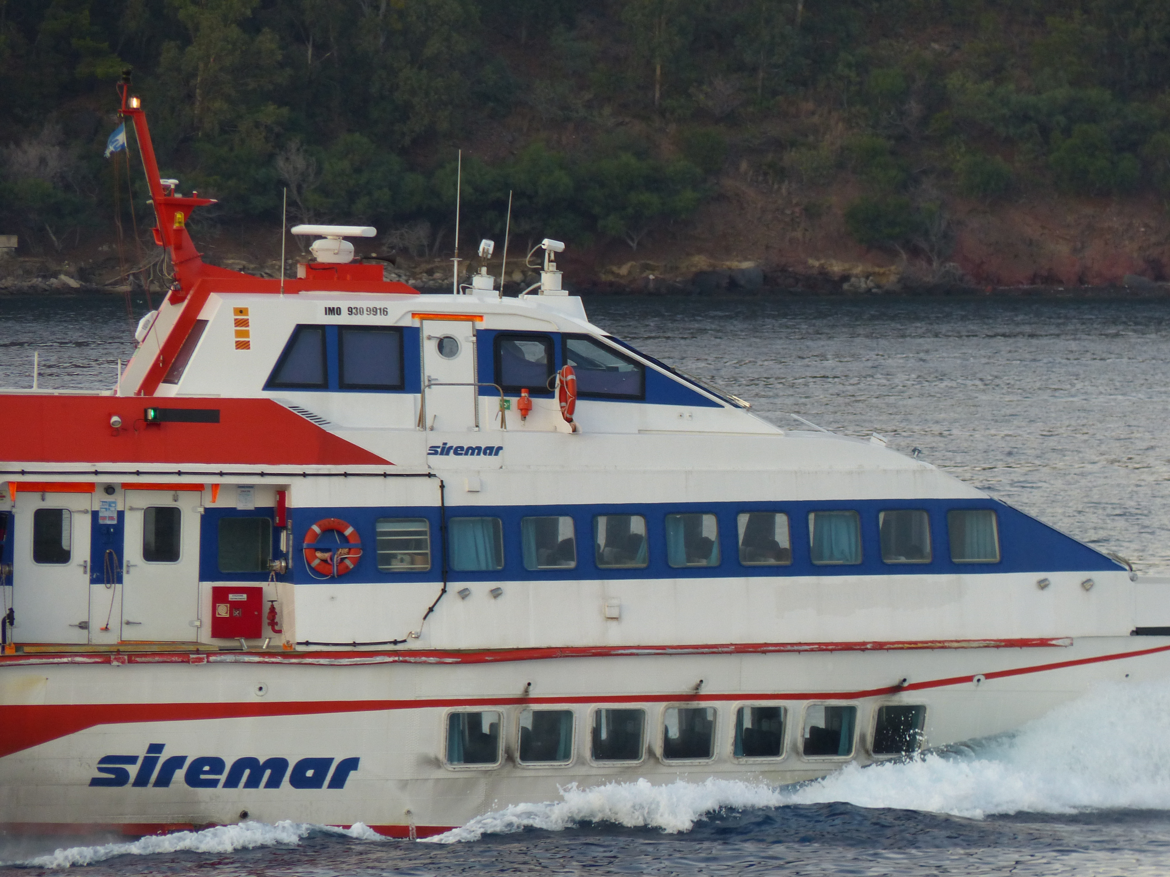 Hidroala, Lipari.